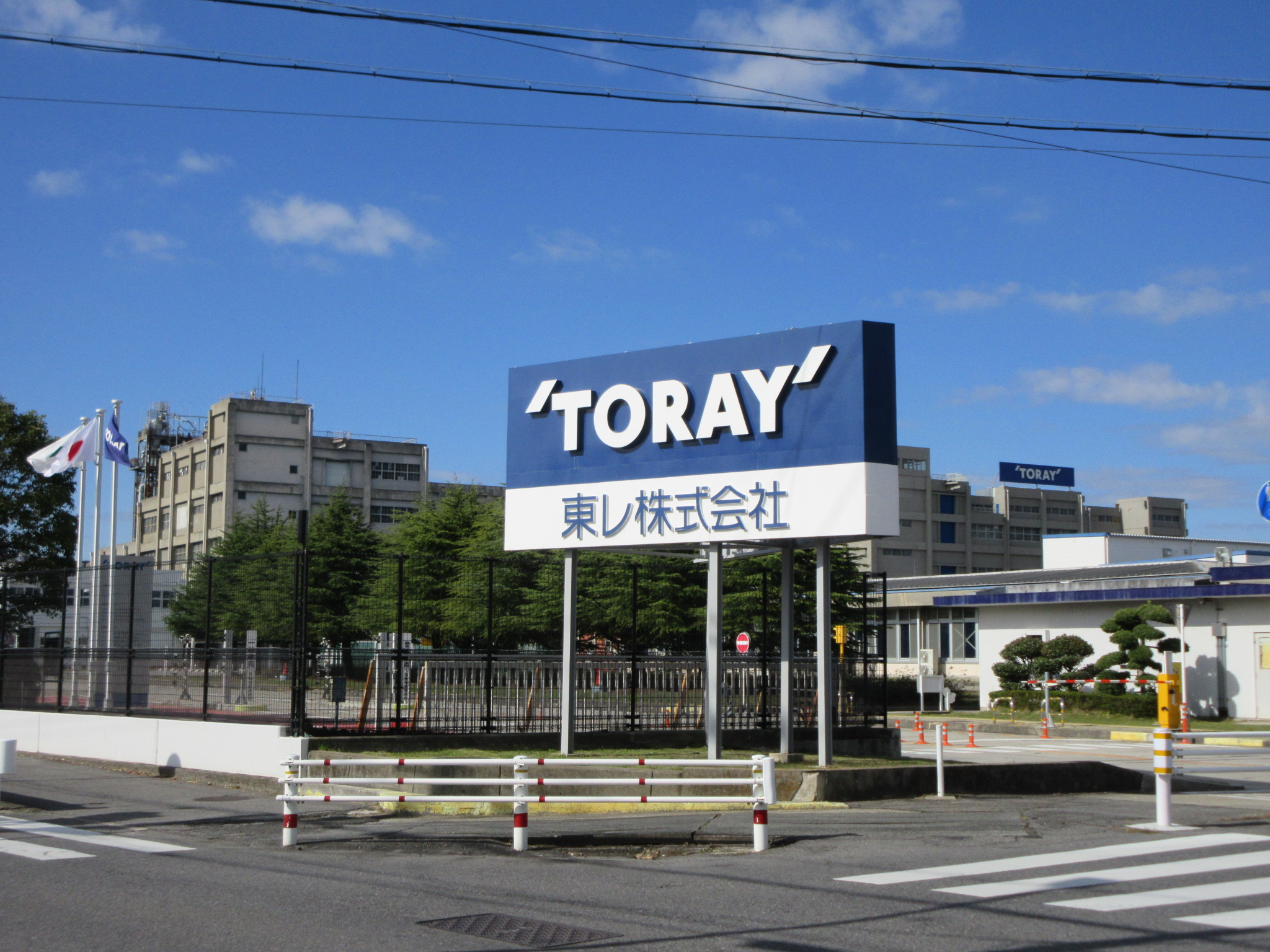 東レ岡崎工場（岡崎市矢作町）